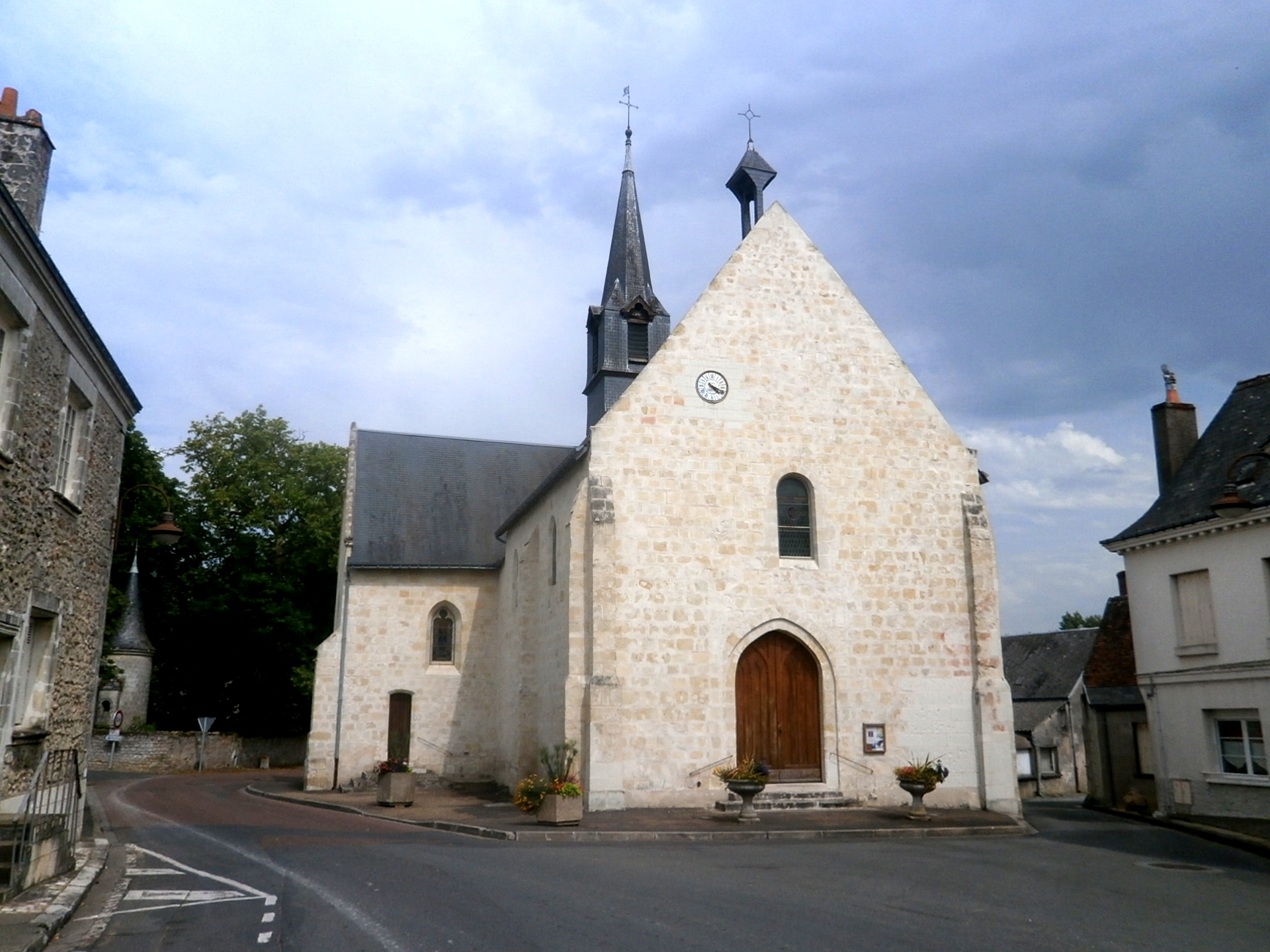 L'église de Rouziers-de-Touraine